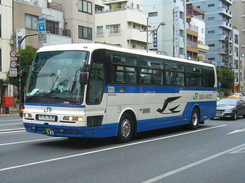 登録番号： 松本200か・589 ジェイアールバス関東(JR Bus Kanto)所属 car no.H654-95403 南アルプス号用 三菱ふそう・エアロバス U-MS821PA